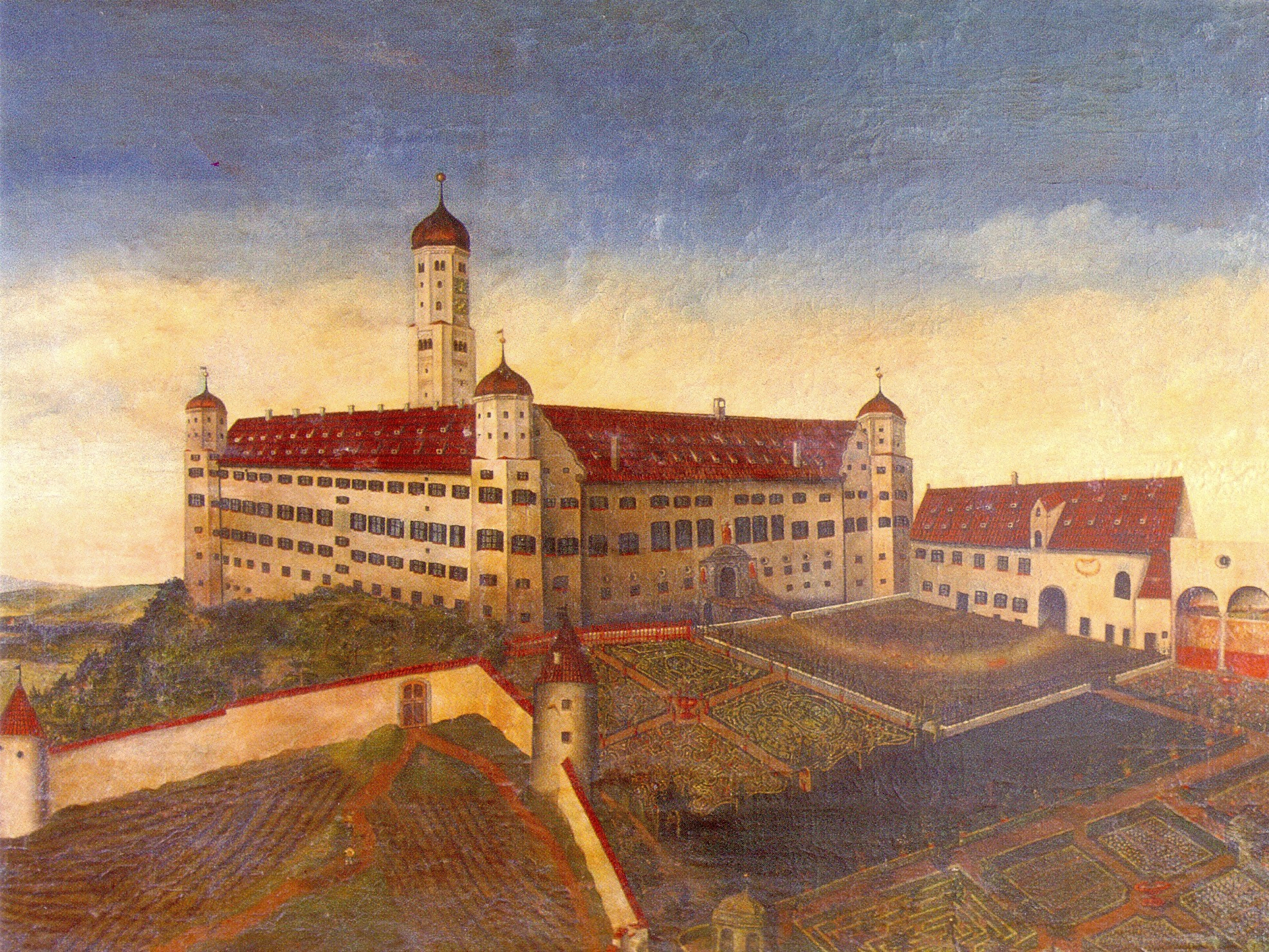 Historische Darstellung des Fuggerschloss Kirchheim/Schwaben; 17. Jahrhundert; Müller